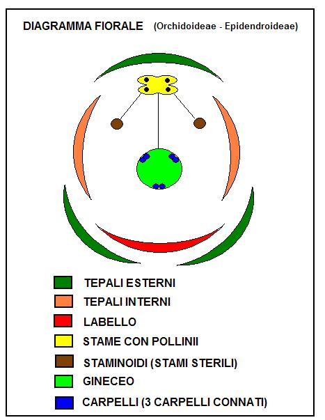 Diagramma fiorale Epidendroideae